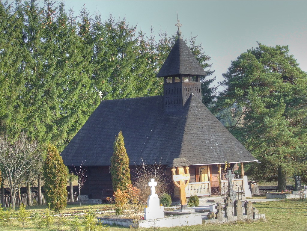 Biserica de lemn de la Mănăstirea Doamnei din Topliţa, judeţul Harghita.